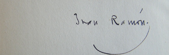 Firma de Juan Ramón Jiménez